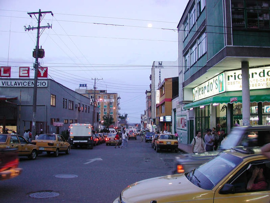 Centro de Villavicencio, Meta, Colombia